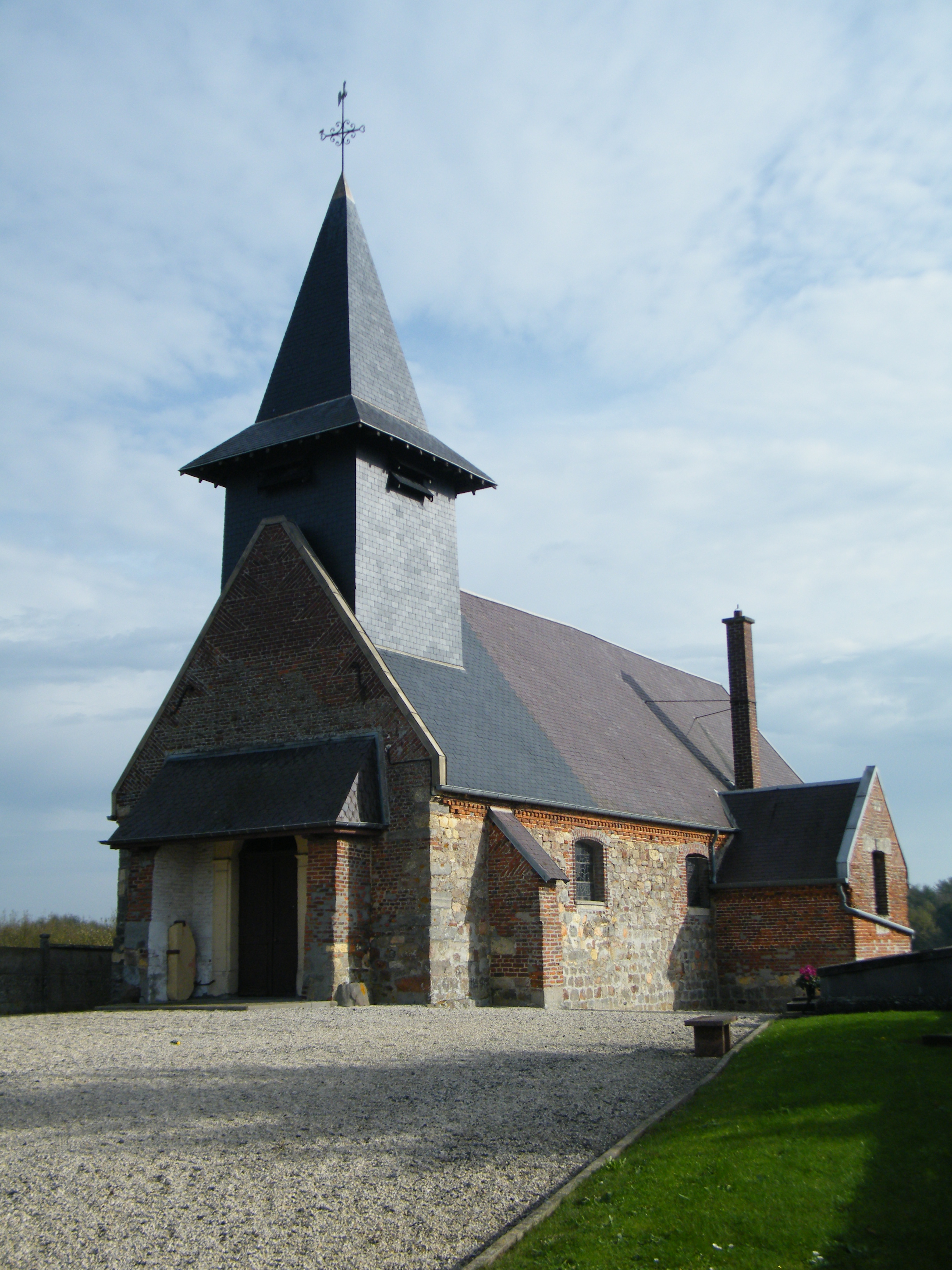 L'église qui dispose d'une cheminée.